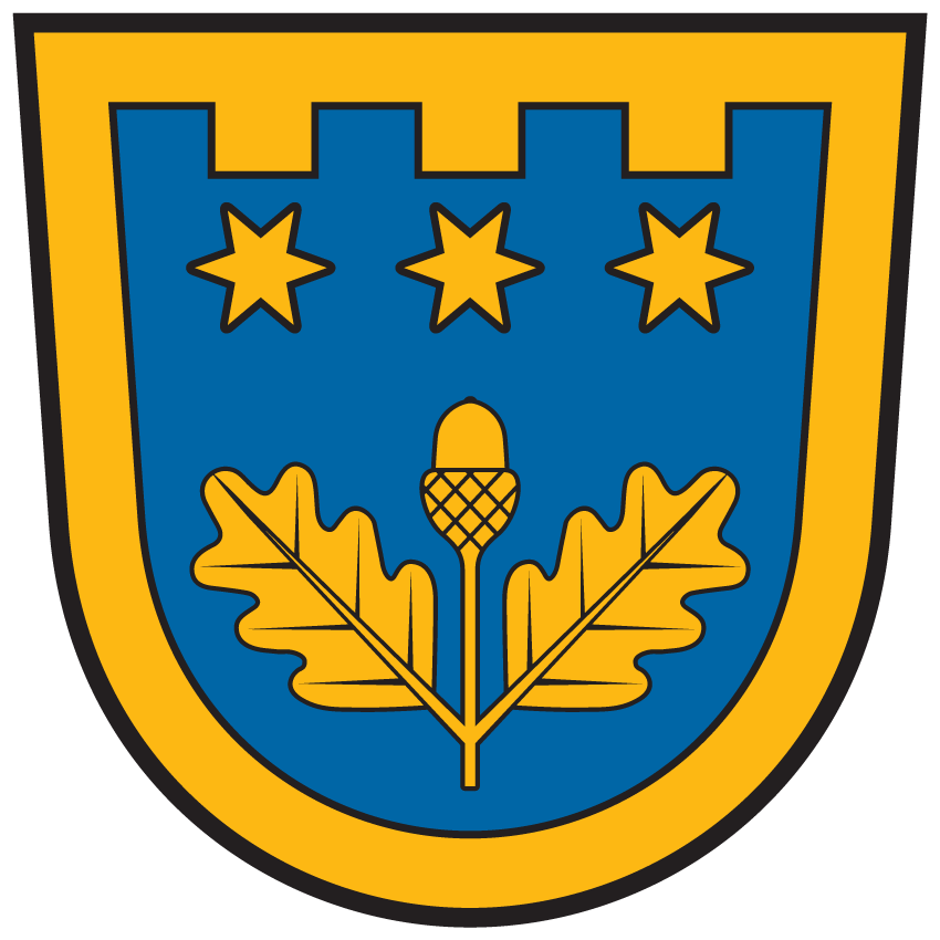 Wappen von Wernberg